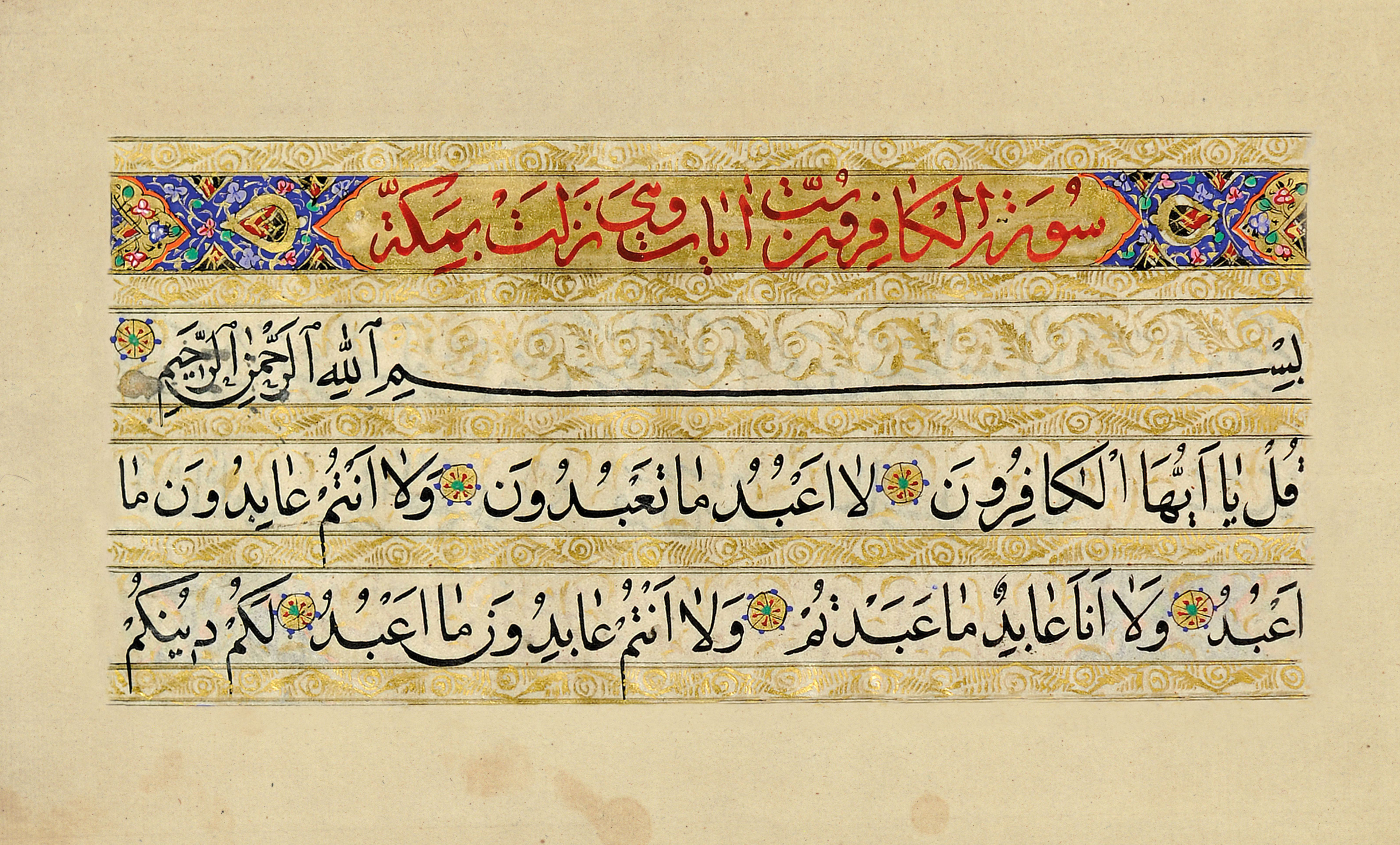 کتابت سوره کافرون در عصر قاجار